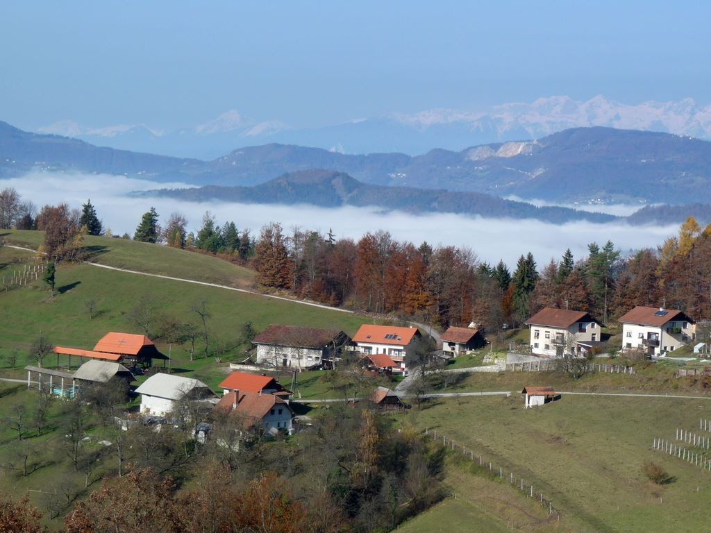 Liberga